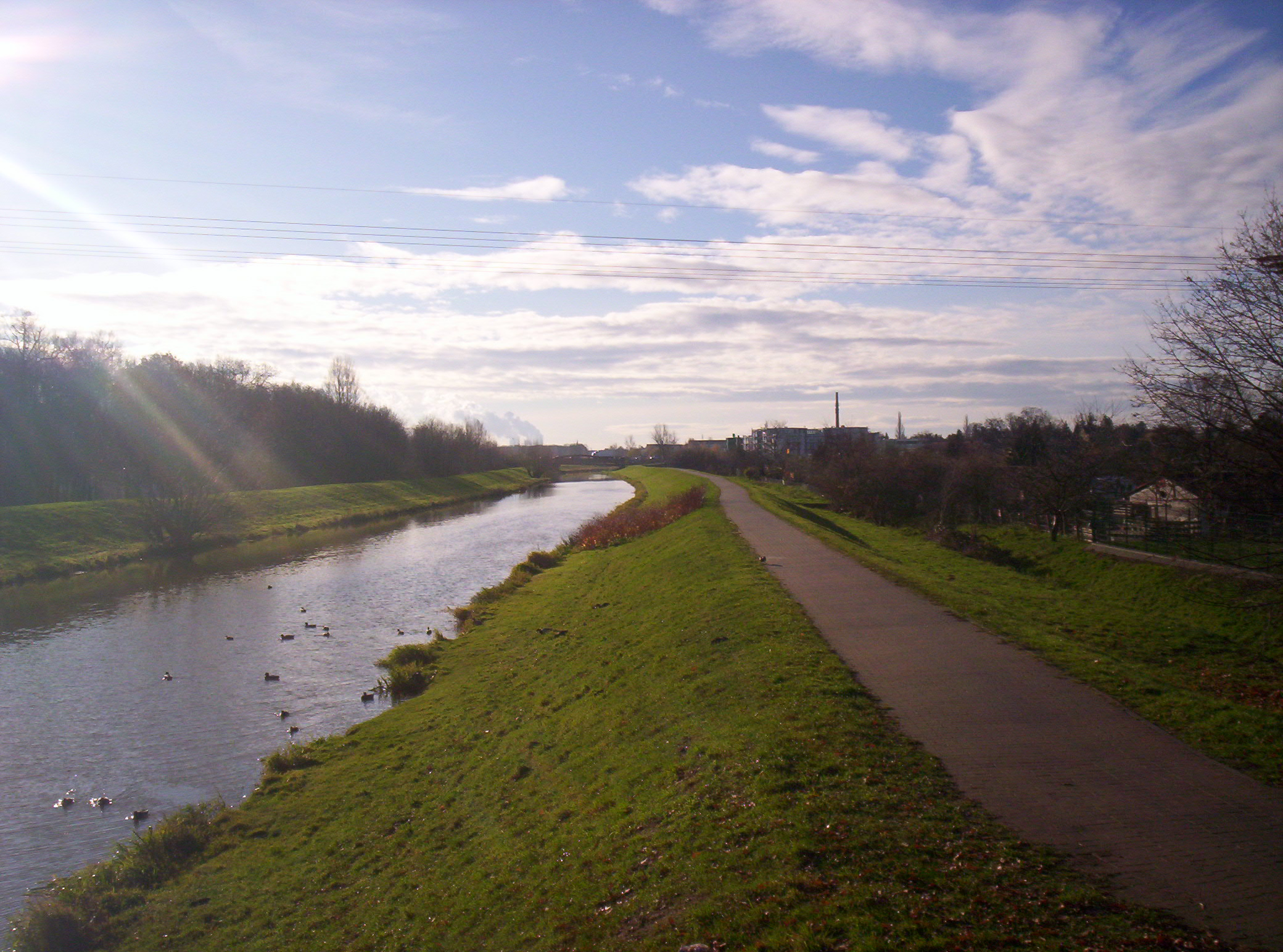 Pleiße in Markkleeberg